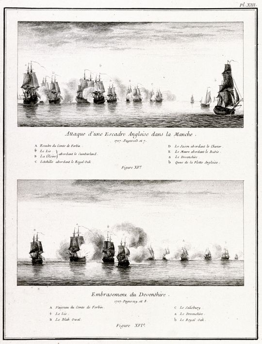 Attaque d'une Escadre Angloise dans la Manche. 1707 Escadre du Comte de Forbin. Le Lis La Gloire, abordant le Cumberland C.L. Achille abordant le Royal Oak D. Le Jason abordant le Chester